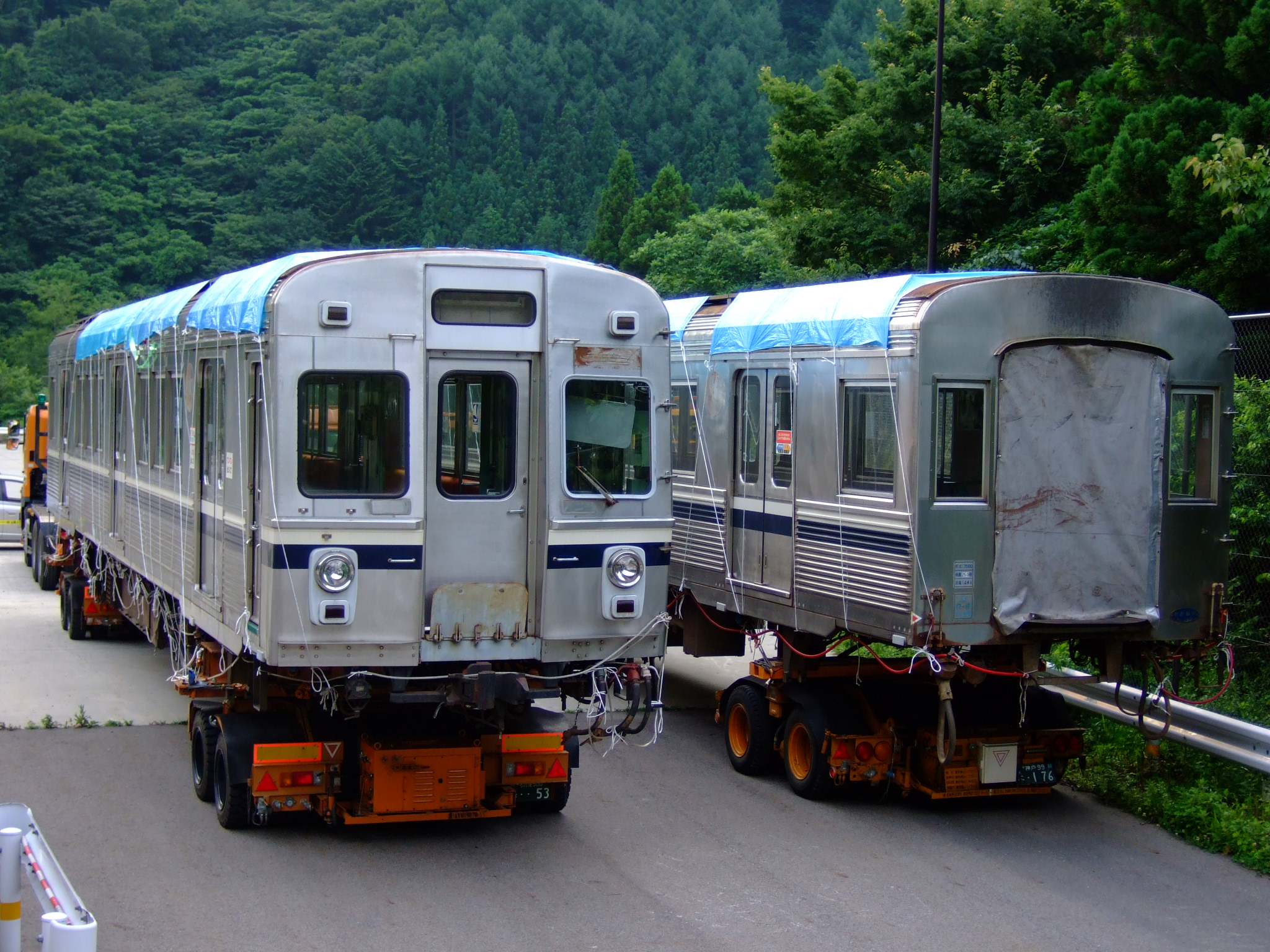 上田電鉄7200系モハ7251号・クハ7551号、長野県塩尻市日出塩～贄川間にて撮影